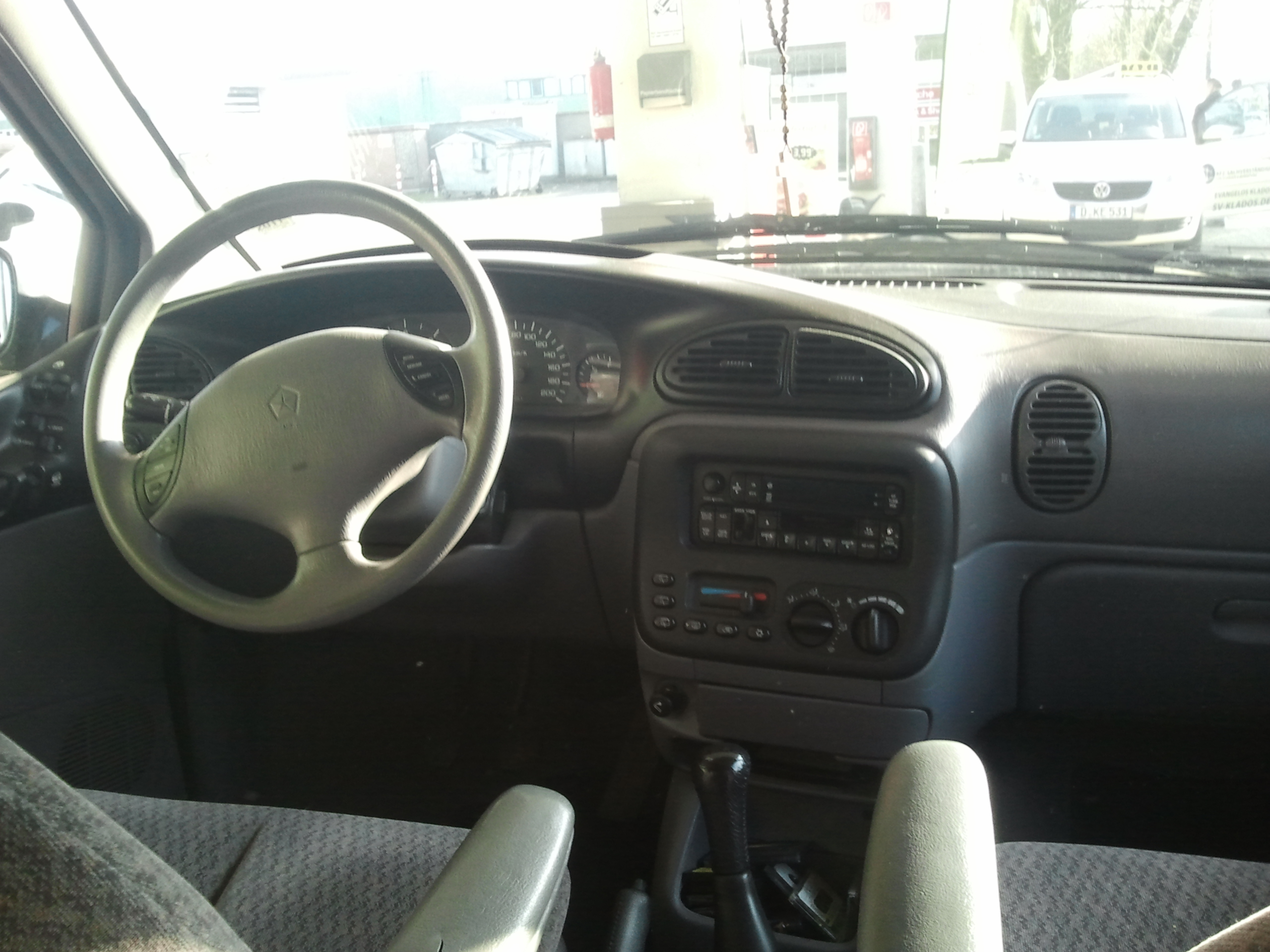 Innenraum eines Chrysler Grand Voyagers (Bj. 2000)